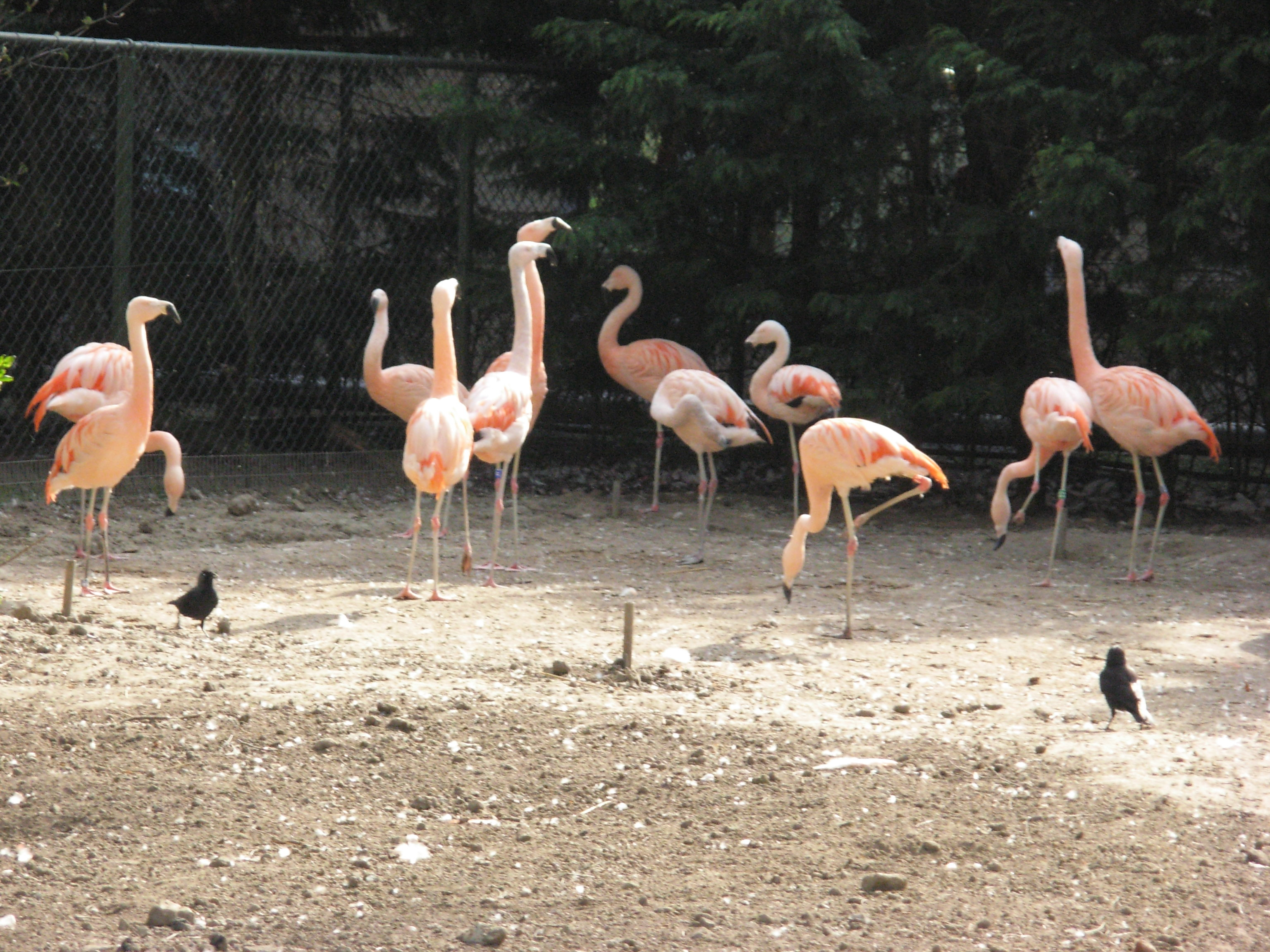 Avifauna är en stor fågelpark i Alphen, Nederländerna.